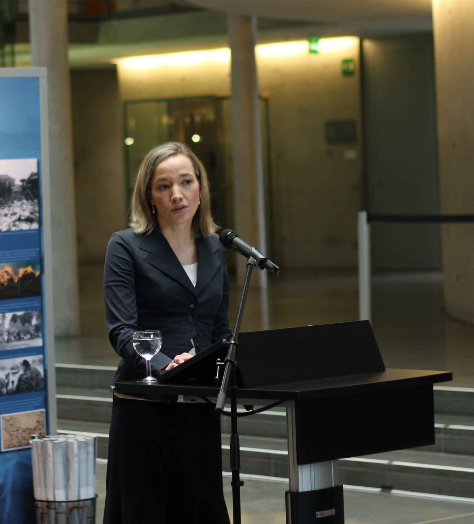 Dr. Kristina Schröder hält eine Rede zur Präsentation der neuen Wanderausstellung des Anne Frank Zentrums im Deutschen Bundestag